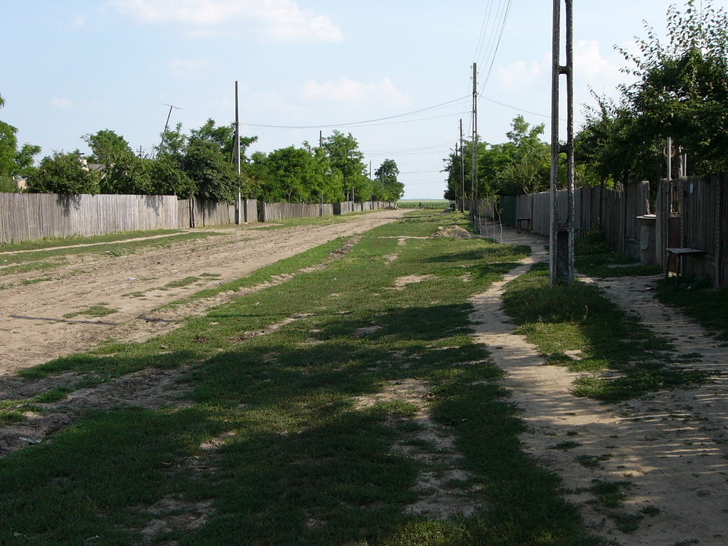 Uliţă din satul Tătaru, Judeţul Brăila.